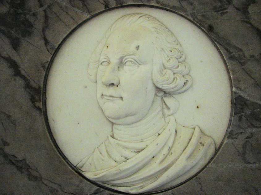 Boye Junge (1697-1778), detalje fra Andreas Weidenhaupts epitafie, Sankt Petri Kirkes gravkapeller, København